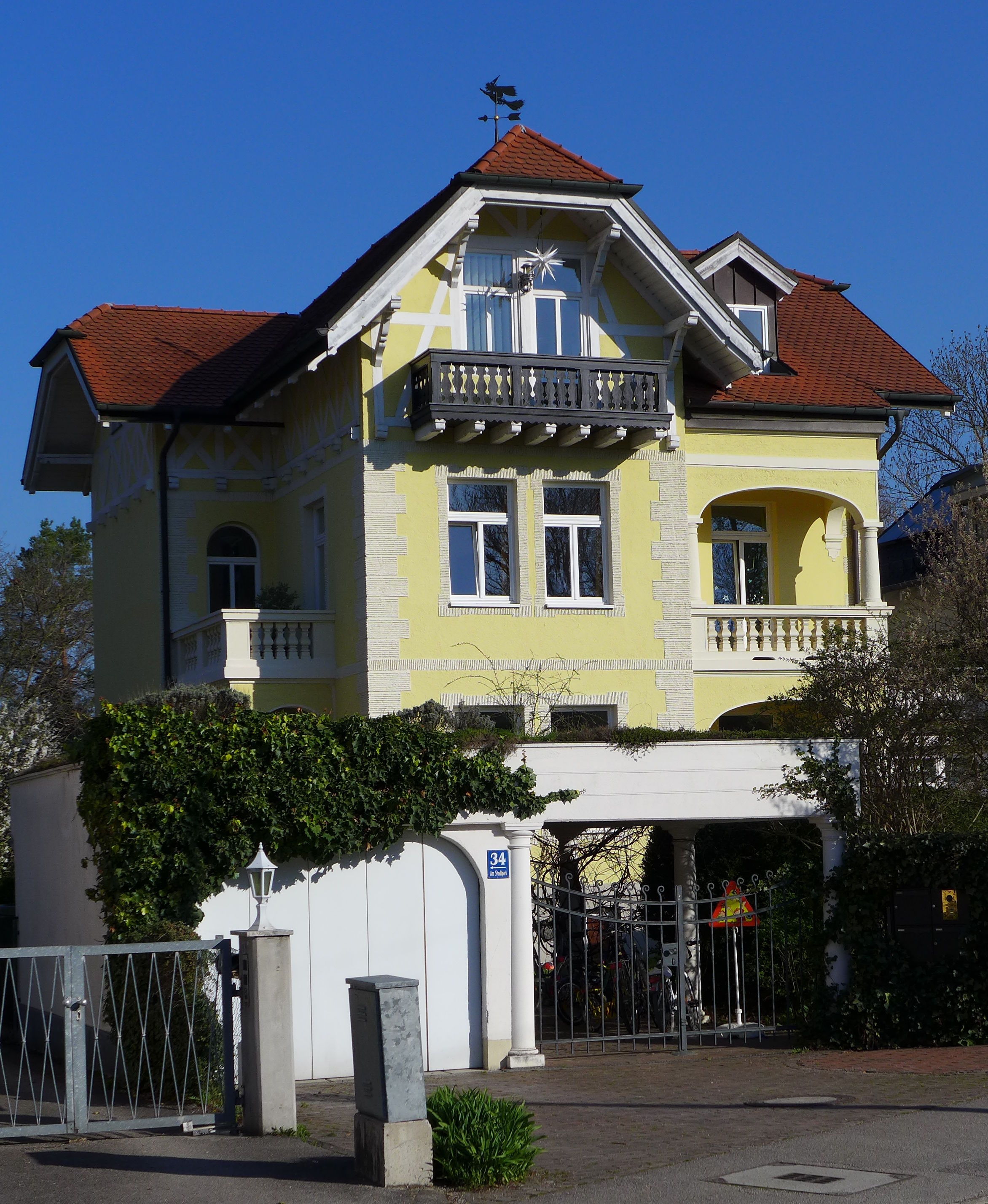 AmStadtpark 34, München